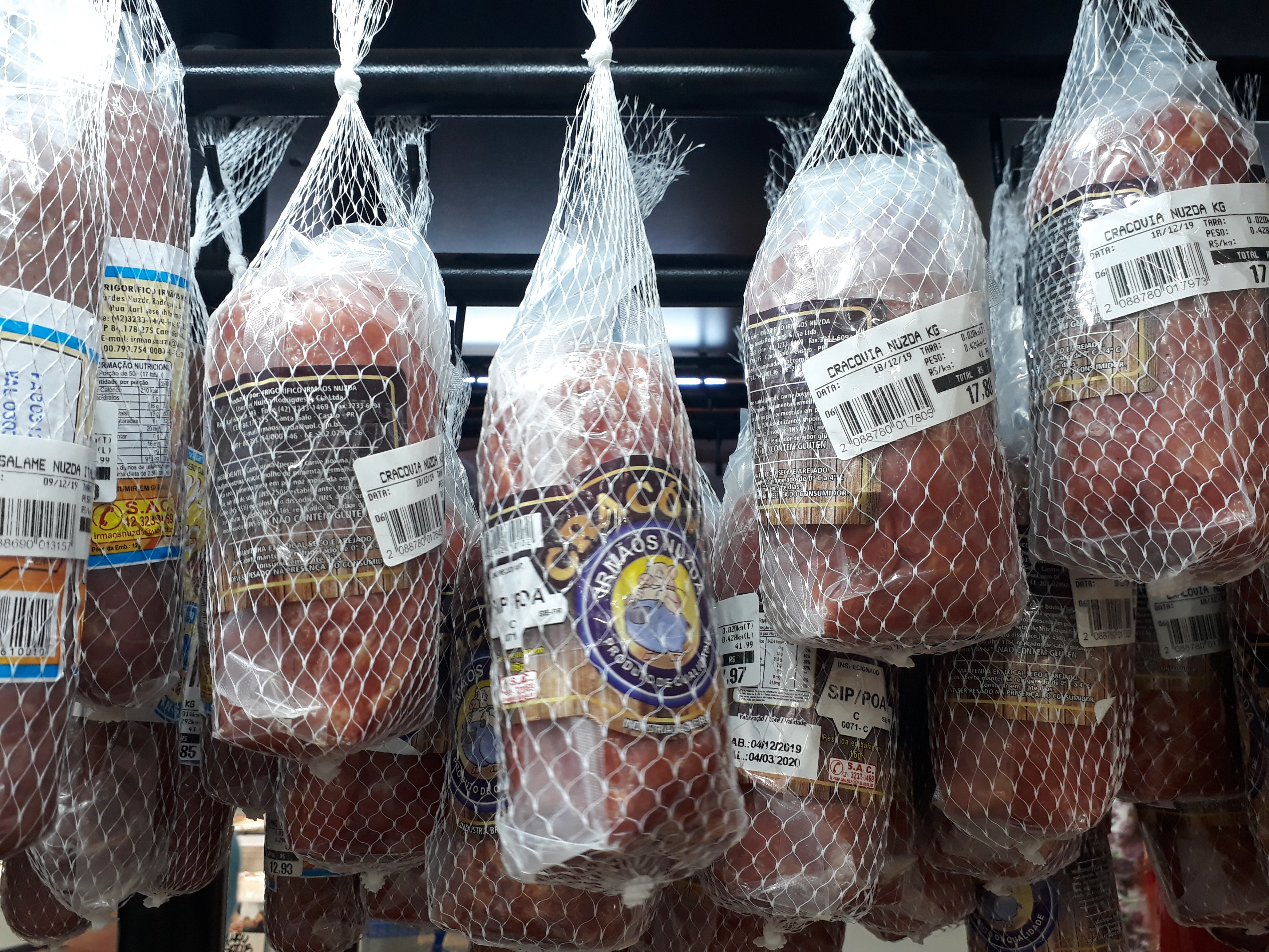 Cracóvias sendo vendidas em mercado de Ponta Grossa, no Paraná.